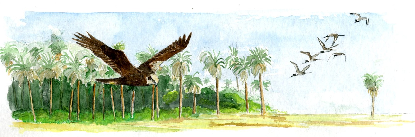 Circus aeruginosus